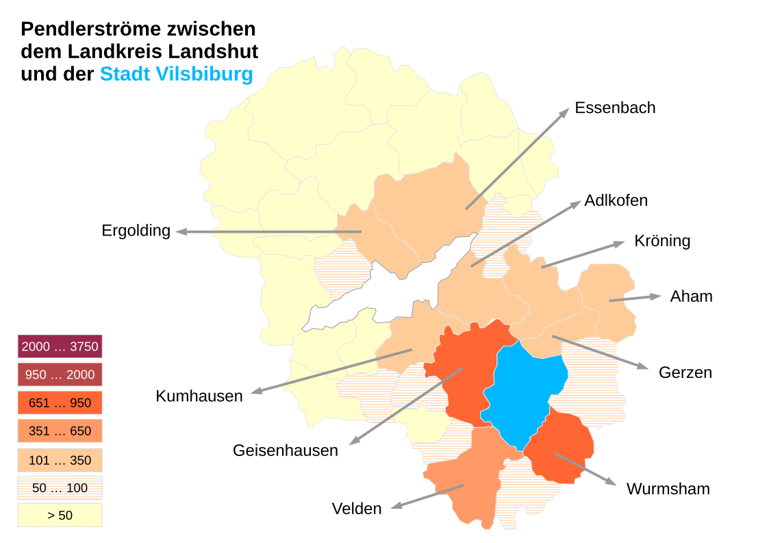 Darstellung der Pendlerströme aus den Gemeinden des Landkreises Landshut in die Stadt Vilsbiburg und umgekehrt. Das der Graphik zu Grunde liegende Zahlenmaterial datiert vom 30. Juni 2016 und stammt vom Statistik-Service Südost der Bundesagentur für Arbeit. Die Zahlen waren vom Regionalmanagement für Stadt und Landkreis Landshut im "BERICHT ZUM PENDLERAUFKOMMEN IN STADT UND LANDKREIS LANDSHUT" veröffentlicht worden.